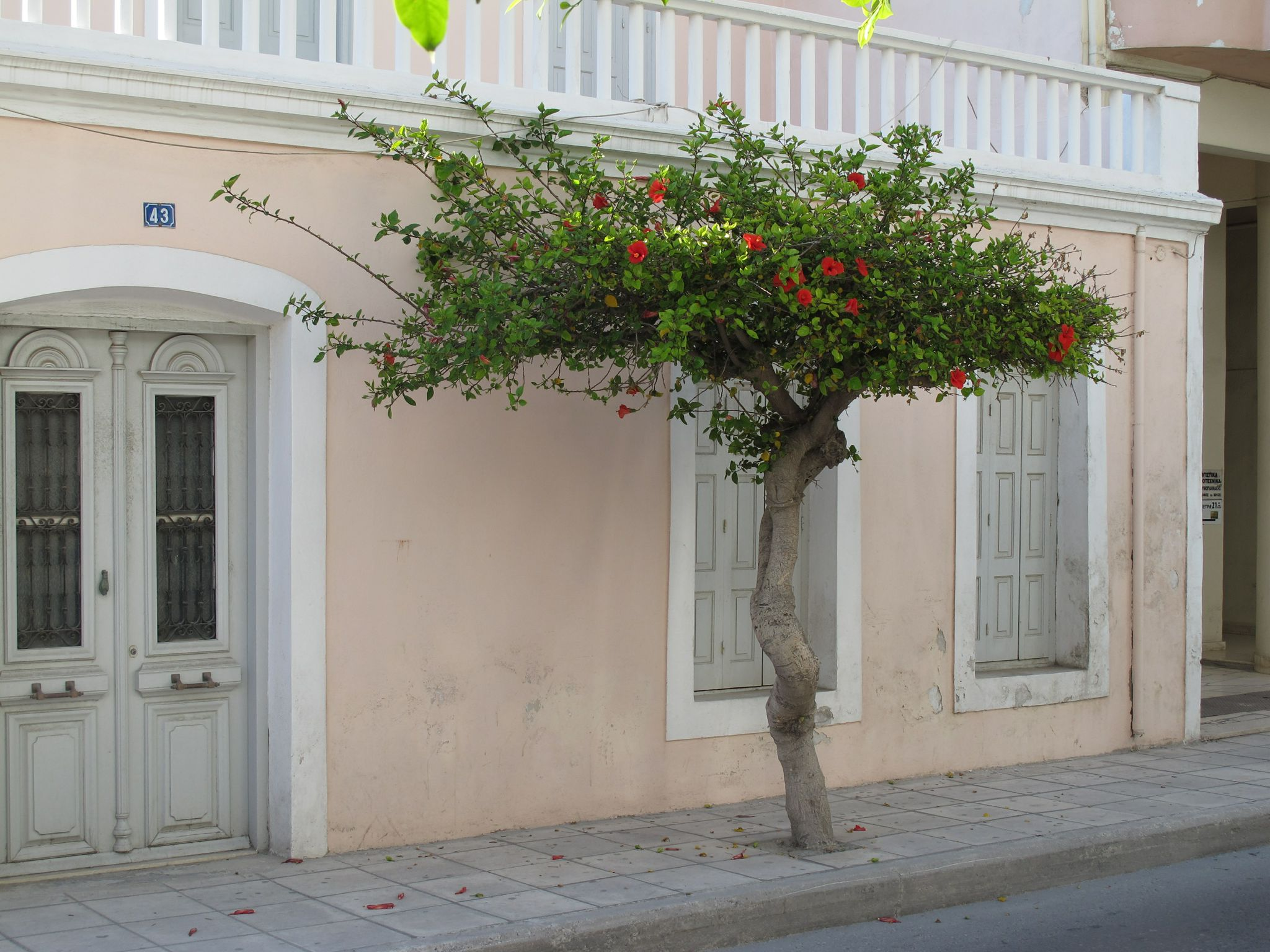 Sujet âgé d'hibiscus planté en alignement urbain